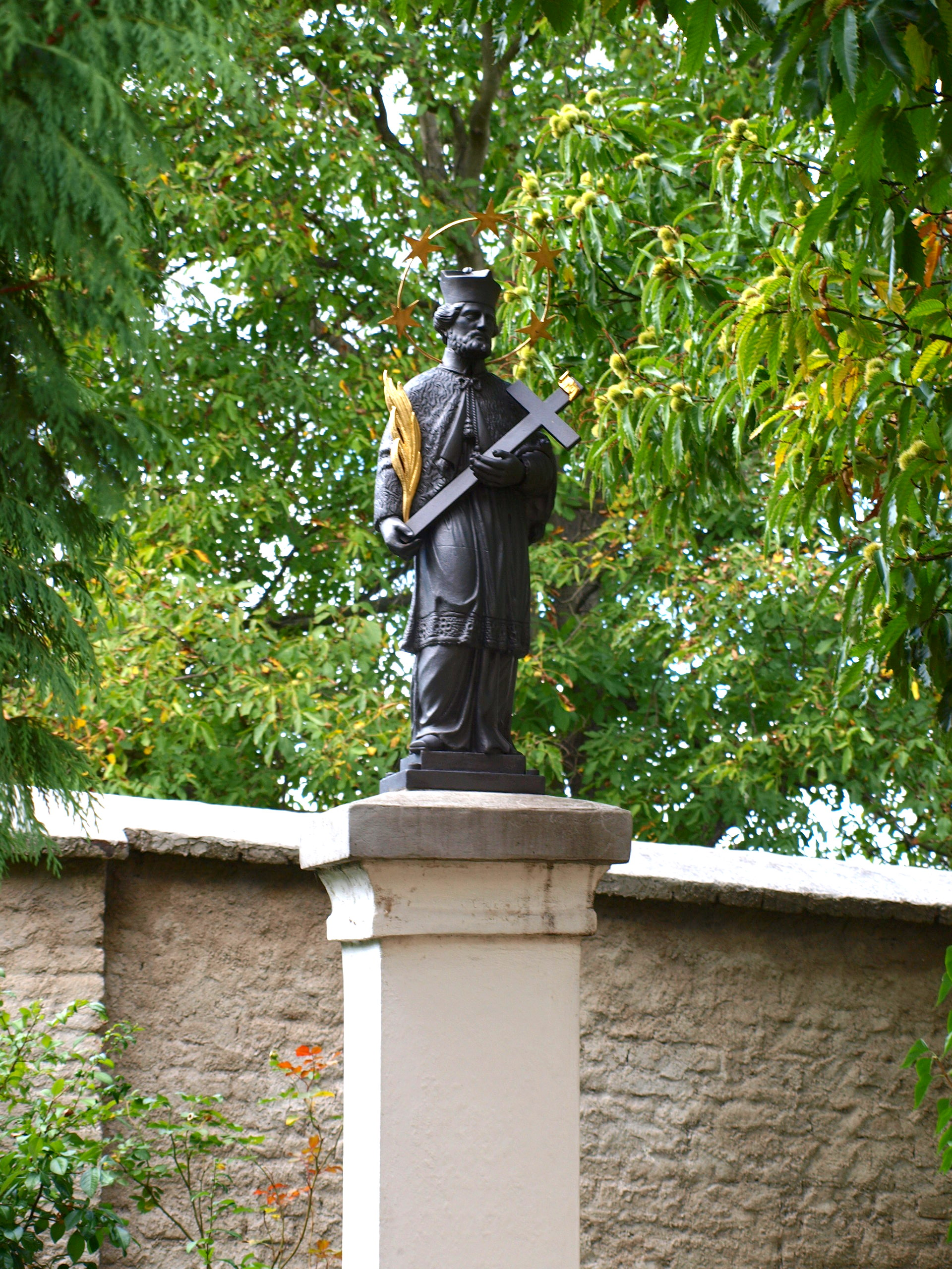 kostel Stětí sv. Jana v Hostivaři